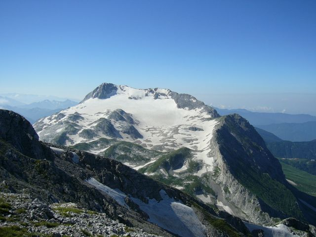 Вершина Фишт с Пшехасу